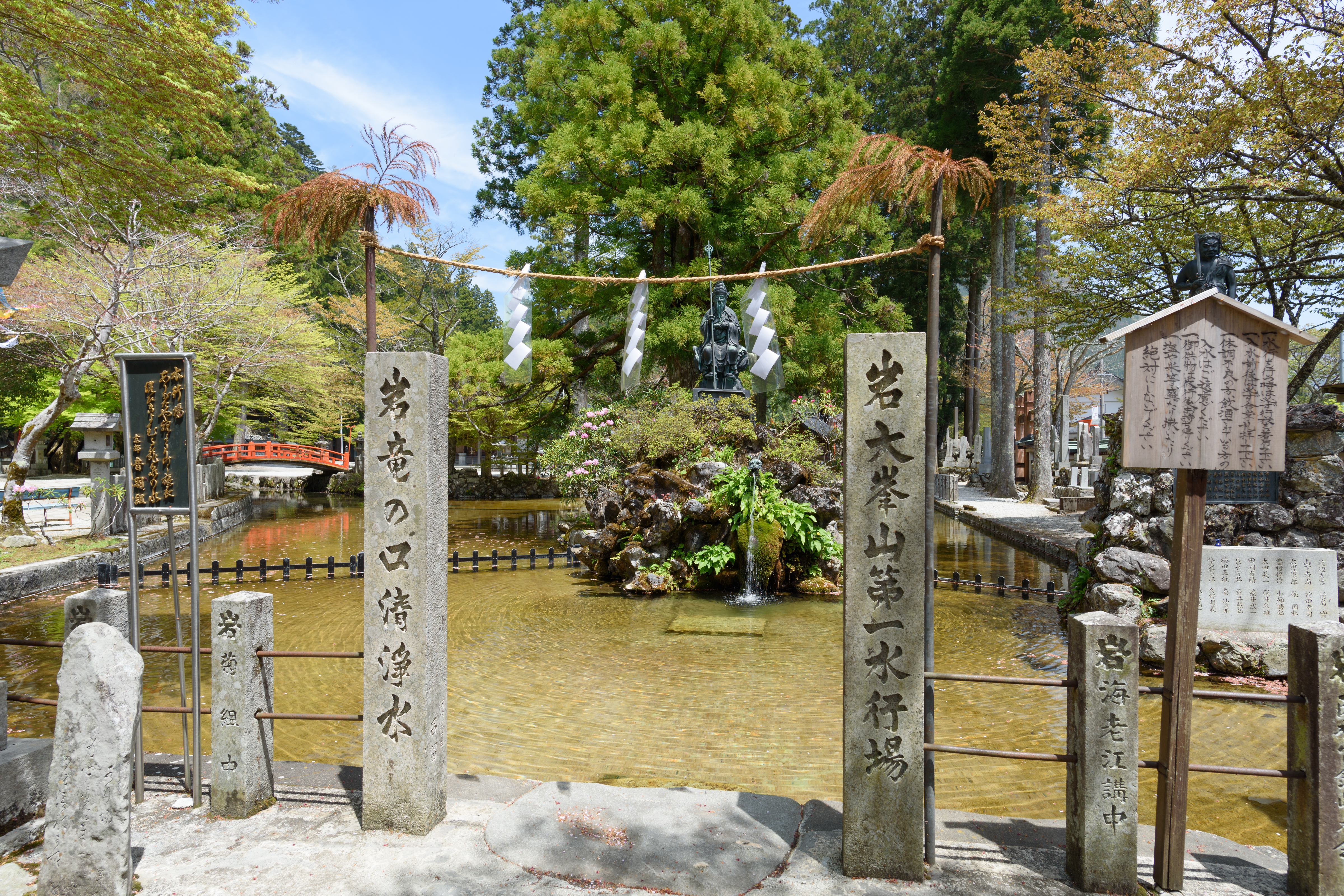 洞川の龍泉寺 大峯山第一水行場